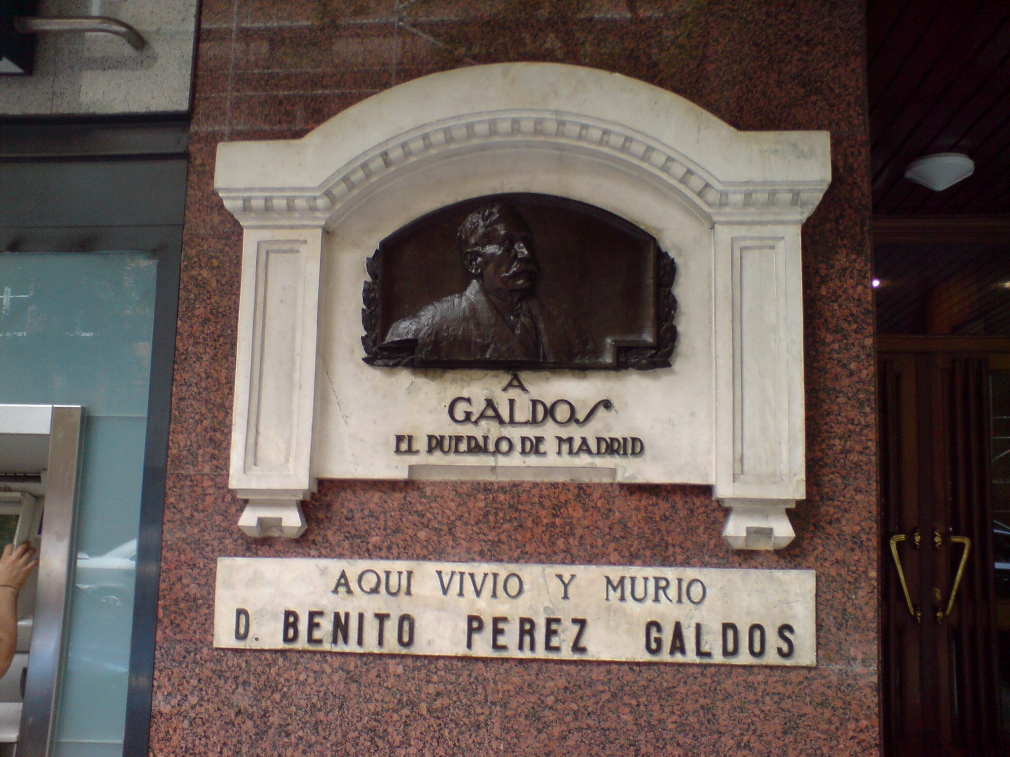 Placa en Hilarión Eslava 7 a la memoria de Benito Pérez Galdós, quien vivió y falleció allí el 4 de Enero de 1920